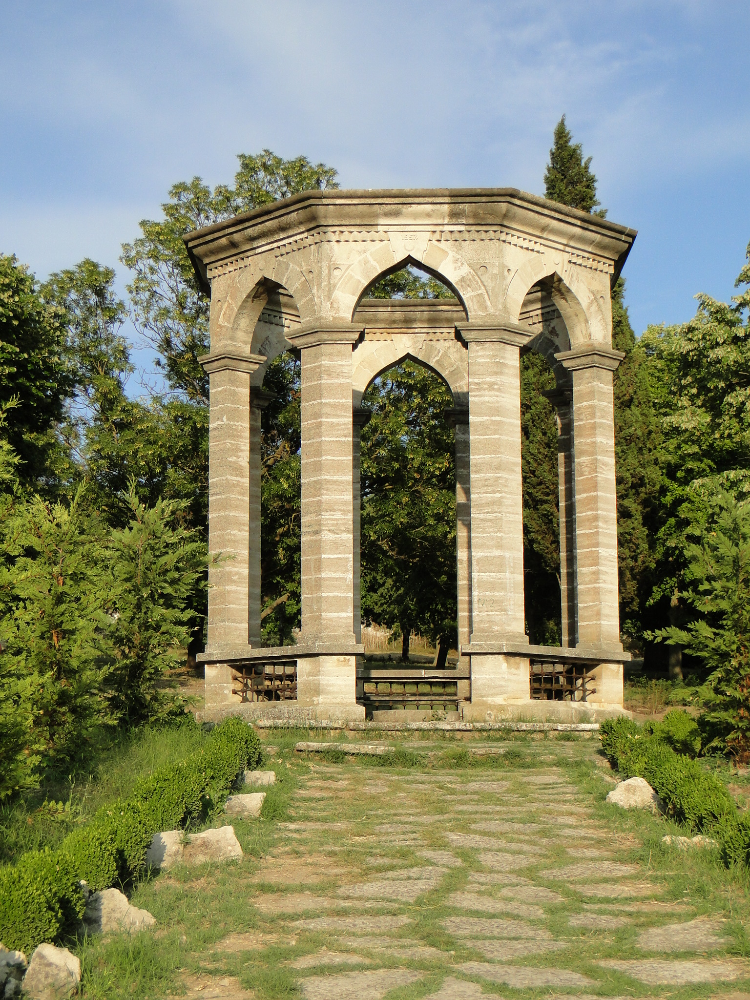 Оброчище - храм на дервишите